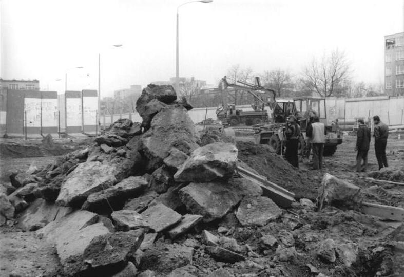 ADN-ZB-Grimm-14.3.90 Berlin: U-Bahnhof Bernauer Strasse öffnet- Fünf neue Grenzübergänge wird es noch vor den Osterfeiertagen in der Stadt geben. An der Brunnenstrase werden die Abfertigungseinrichtungen so gestaltet, das der U-Bahnhof Bernauer Strasse geöffnet und von westlicher Seite aus erreicht werden kann.